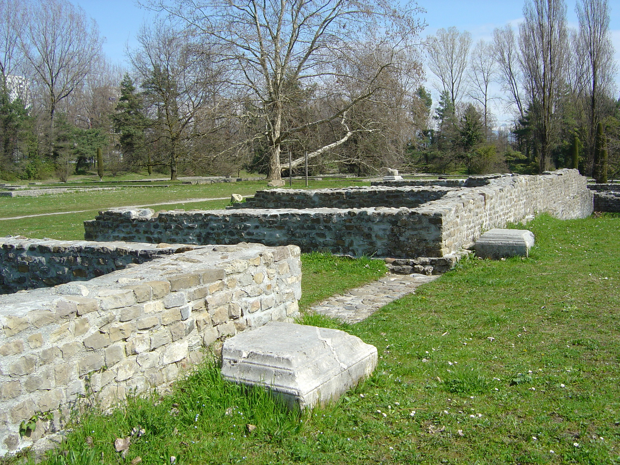 Vestiges archéologiques de Lousonna